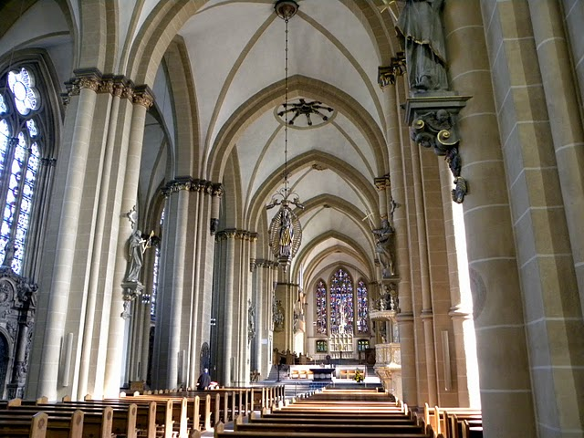 Paderborner Dom